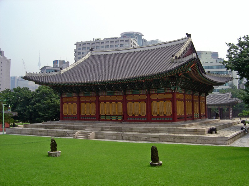 Deoksugung (Deoksu Palace)in Seoul, Korea.